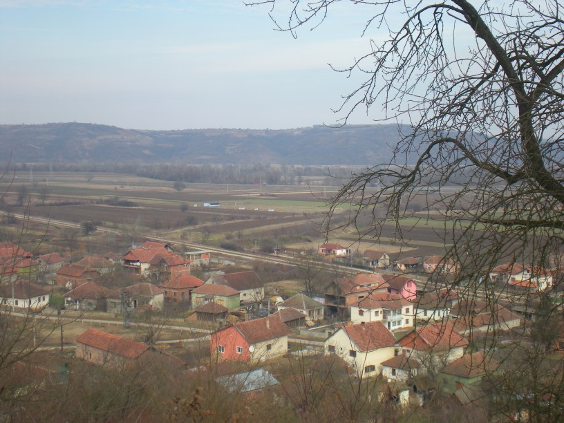 Pogled na selo Novo Laniste.